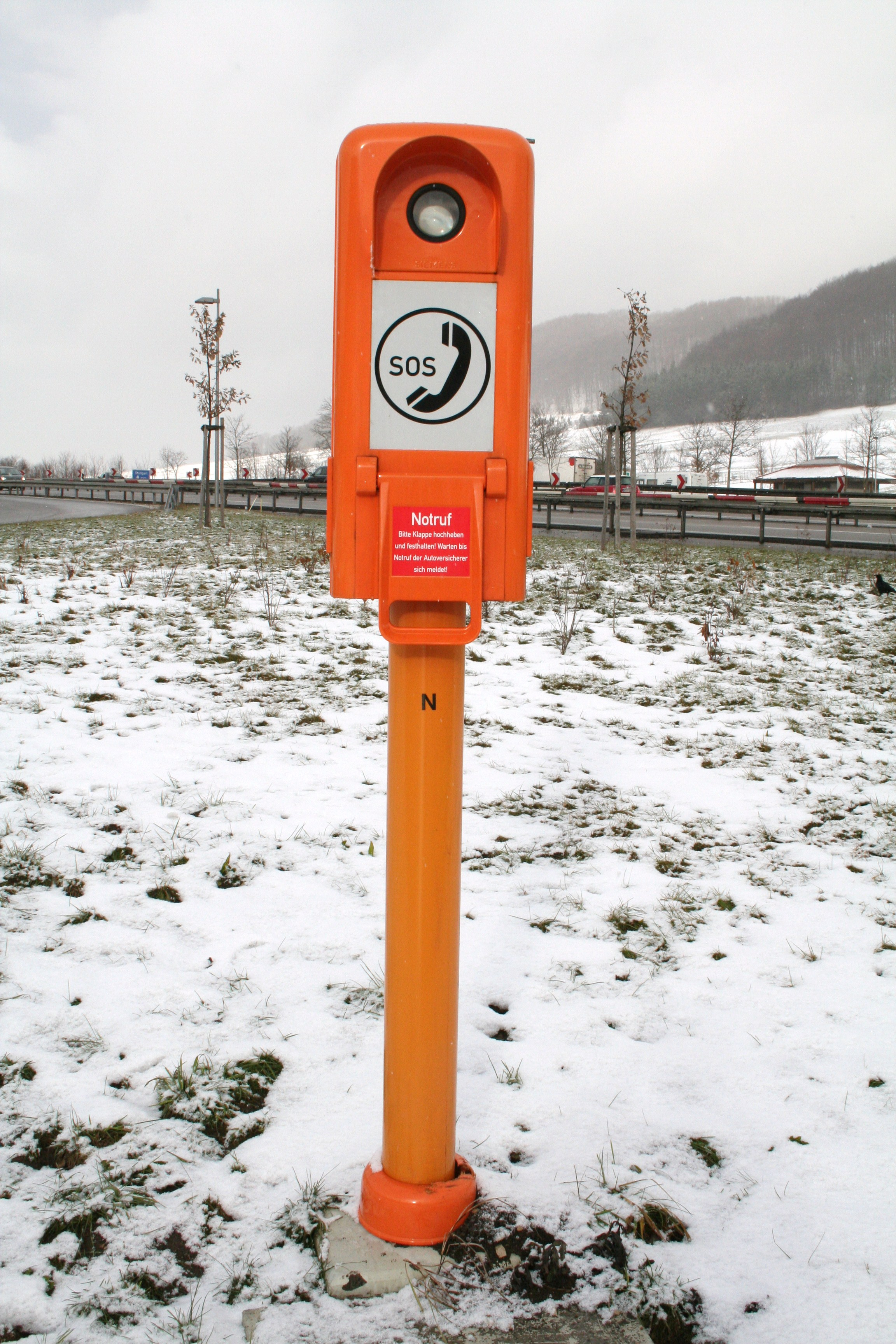 Notrufsäule mit "klassischer" Sprechklappe